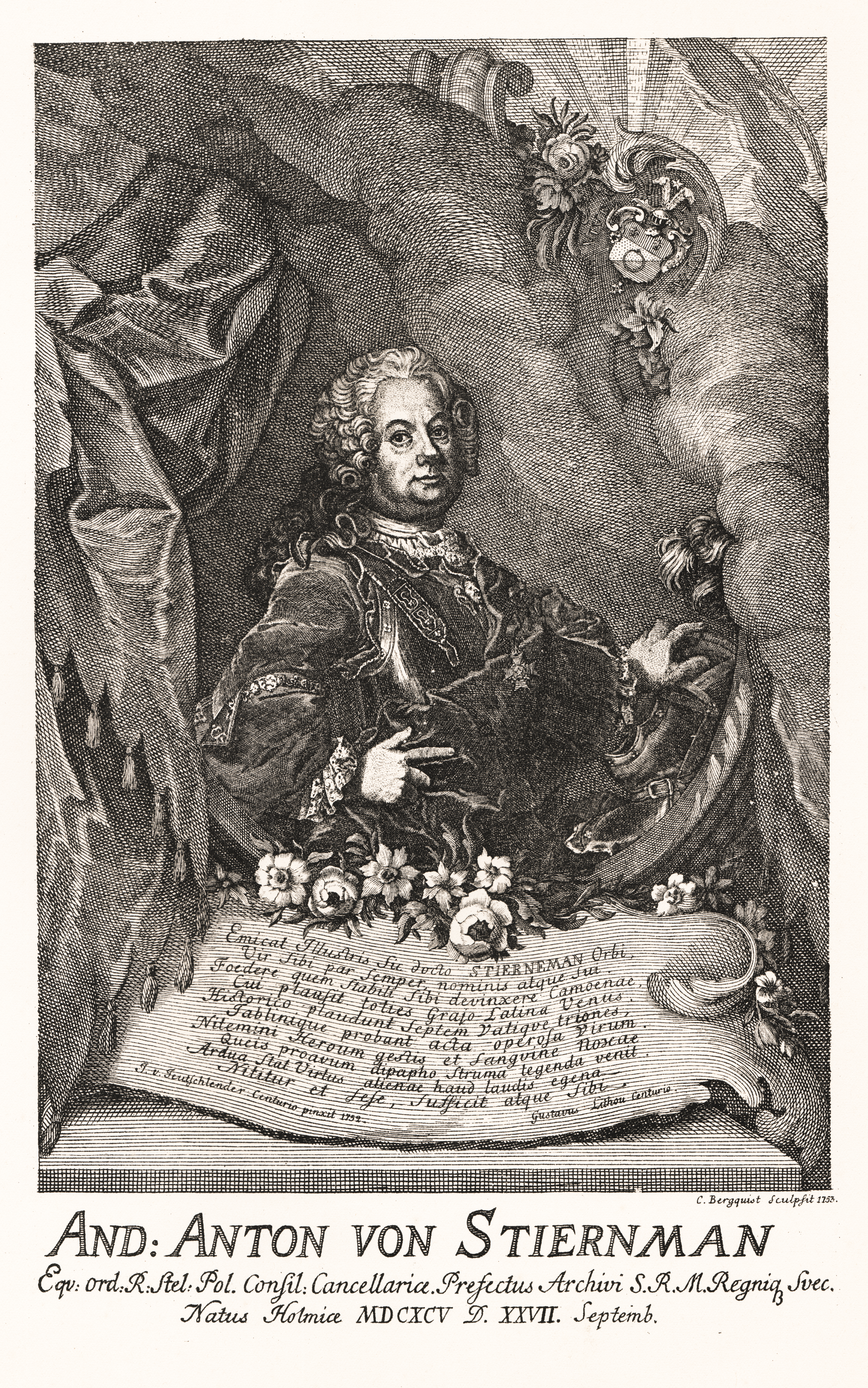 Anders Anton von Stiernman (1695-1765). Hans porträtt, sannolikt af Schröder, finnes i riksarkivet; det är dock ej detta, som är graveradt af Bergqvist 1753. Hvarest originalet till denna bild förvaras är ej kändt Den synes varit utförd af kapten J. v. Teutschländer (Deutschländer?). Den latinska versen under gravyren är författad af kaptenen Gustaf Lithou, under hvilkens äfven af Bergqvist graverade bild Stiernman 1754 har skrifvit en latinsk inskription.